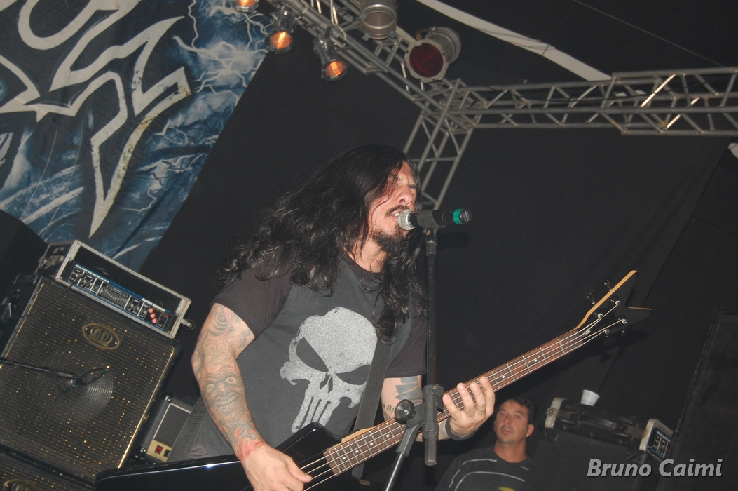 death metal band Krisiun